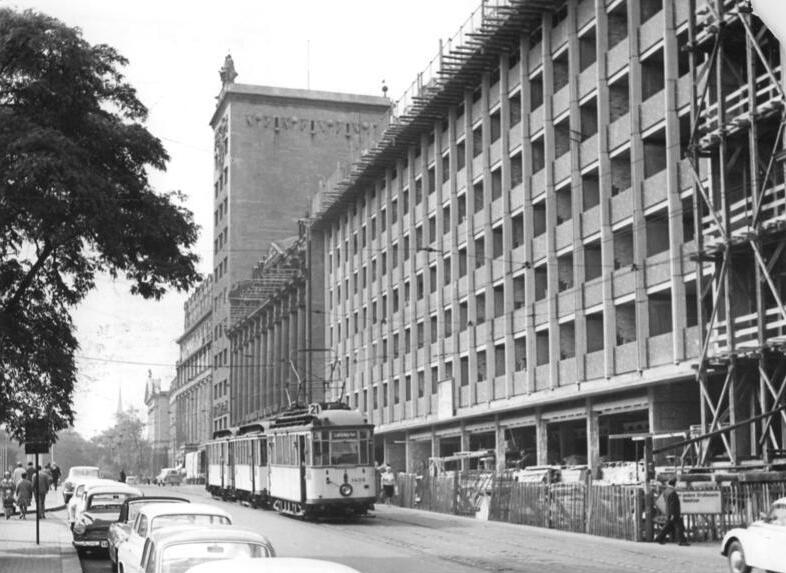 Zentralbild-Koch Th 15.10.1964 Leipzig: Internat für Studentinnen im Rohbau fertig In der leipziger Goethe-Straße entsteht das Studentinnen-Internat "Jenny Marx". Das Gebäude, das sich harmonisch in die architektonische Gestaltung des Karl-Marx-Platzes einfügt, verfügt über sechs Bettengeschosse, die während der Messezeiten in- und ausländischen Gästen zur Verfügung stehen werden."